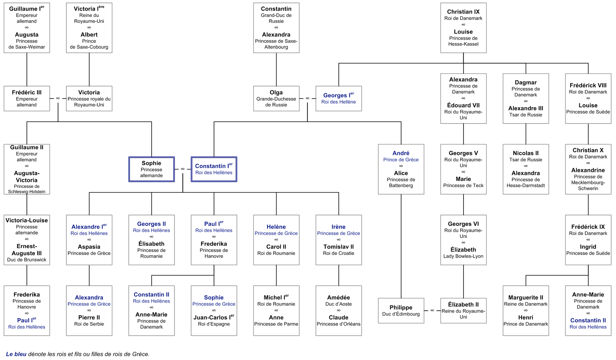 Arbre généalogique ascendant et descendant de Constantin Ier de Grèce et de son épouse Sophie, réalisé à partir de Constantin Ier de Grèce.